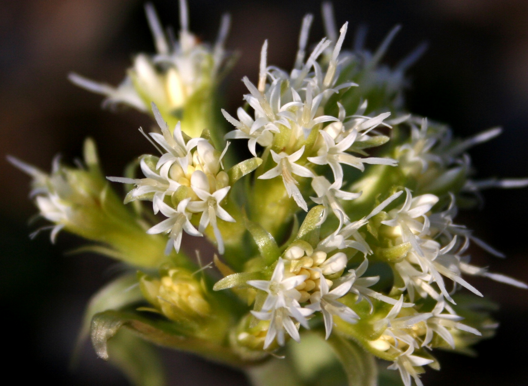 Farfaraccio bianco - Località : Pian di Coltura, Lentiai (BL), 800 m s.l.m.